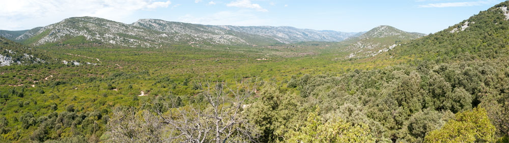 su golgo